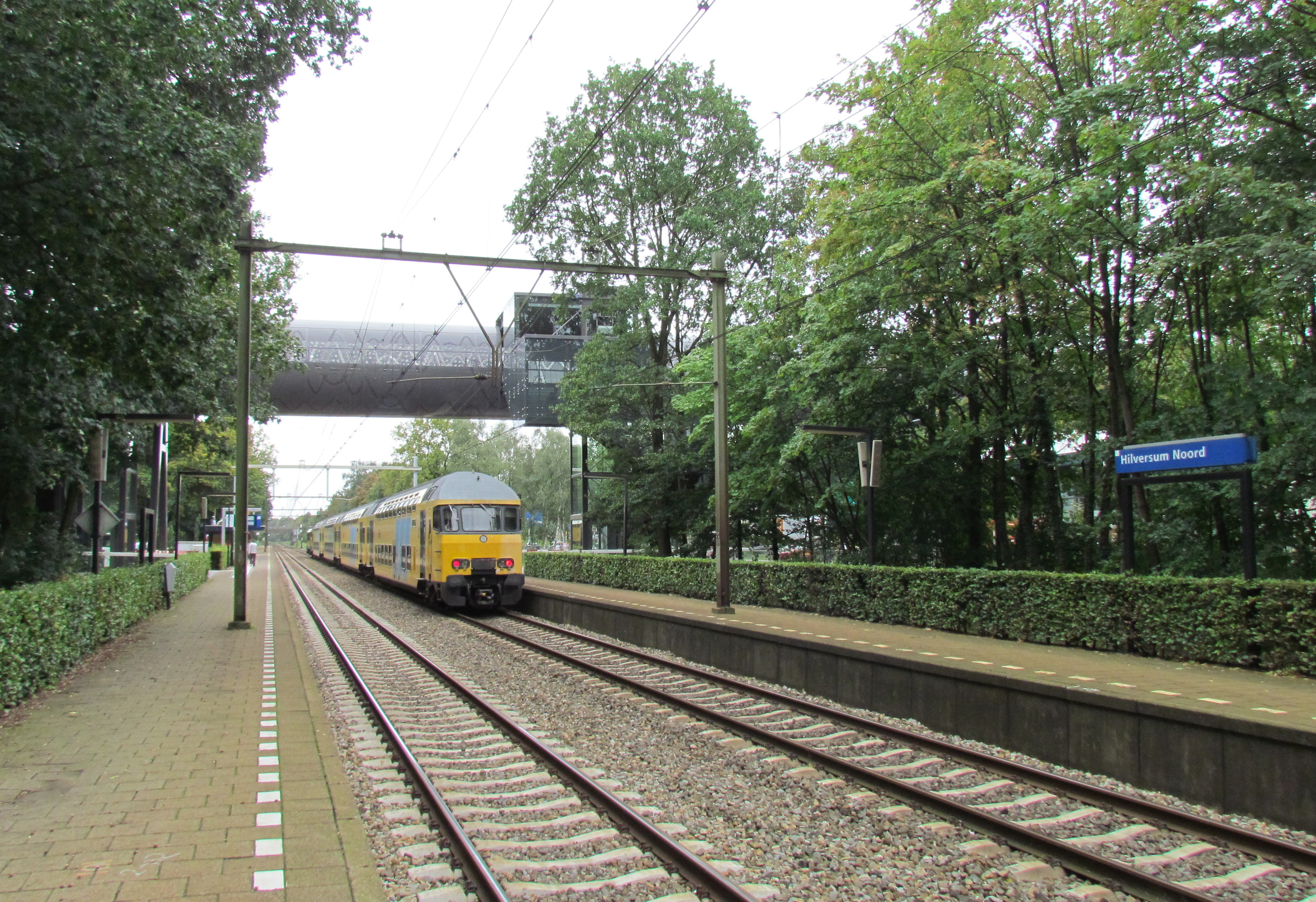 Station Hilversum Noord met nieuwe traverse, vanaf de noordkant